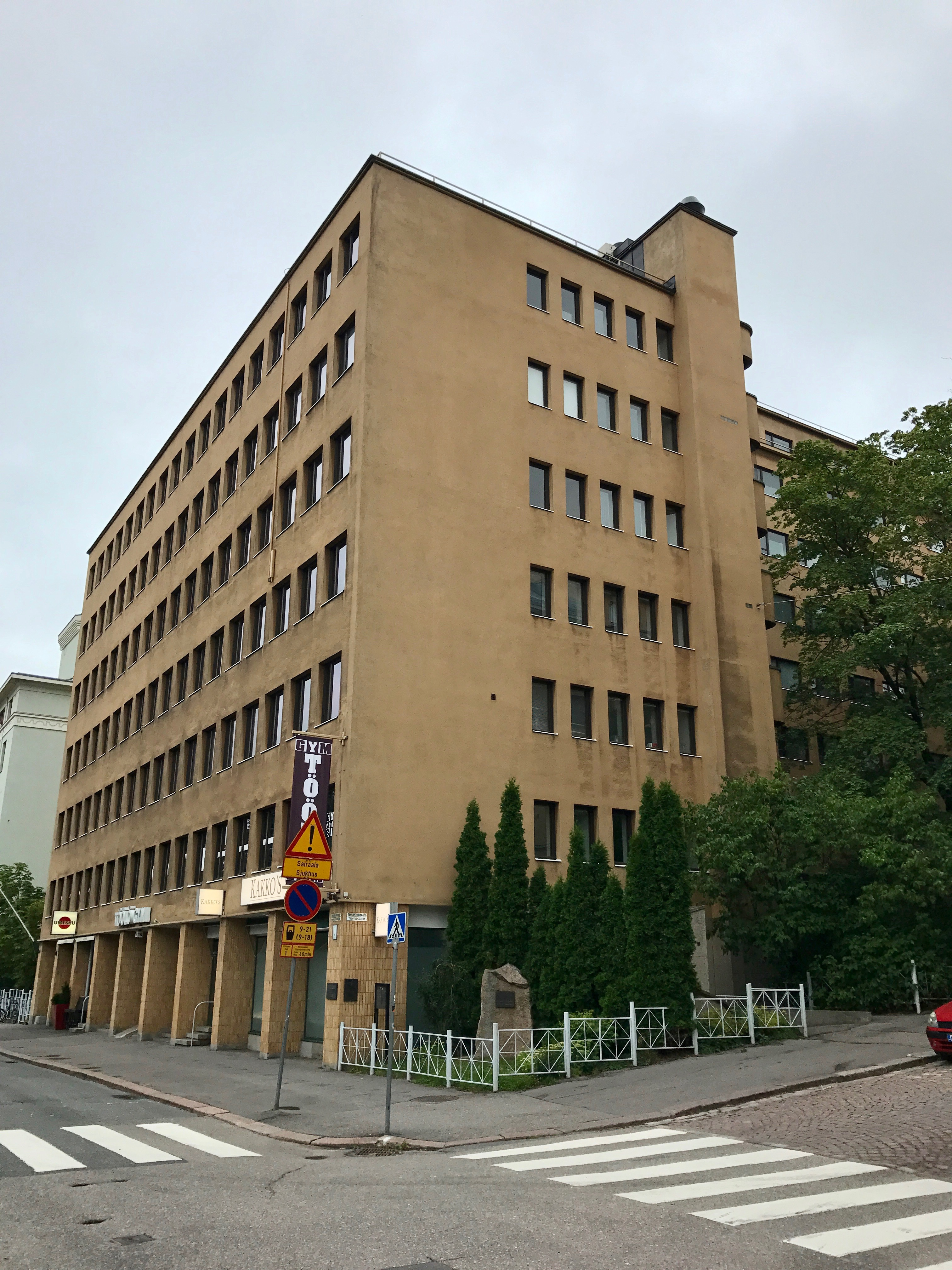 Helsingin suojeluskuntatalo Taka-Töölössä, osoitteessa Pohjoinen Hesperiankatu 15.